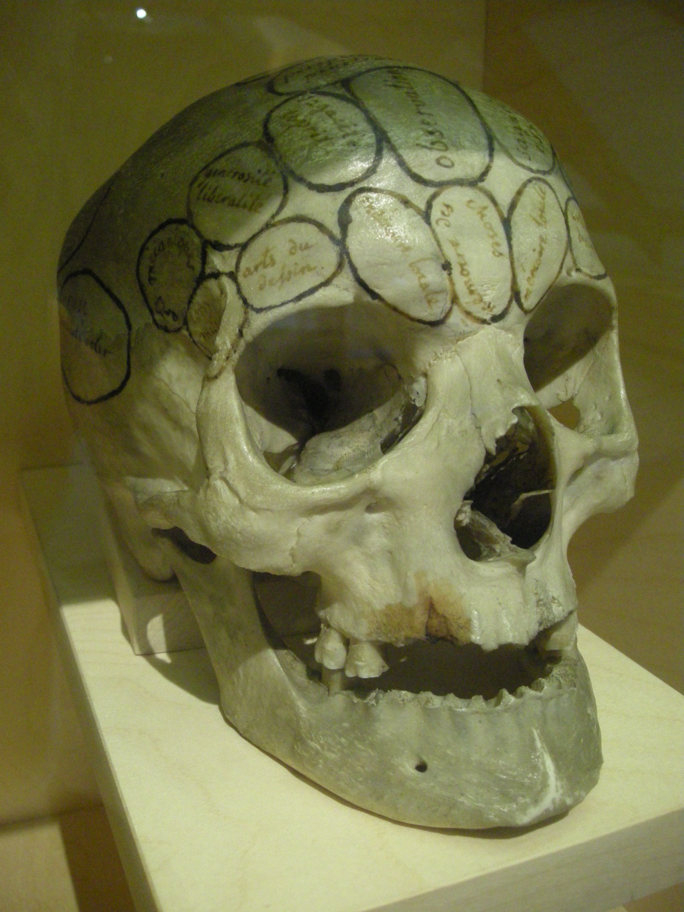 Crâne humain annoté par le pasteur Oberlin selon le système de Franz Joseph Gall (phrénologie) - Musée Jean-Frédéric Oberlin à Waldersbach (67)